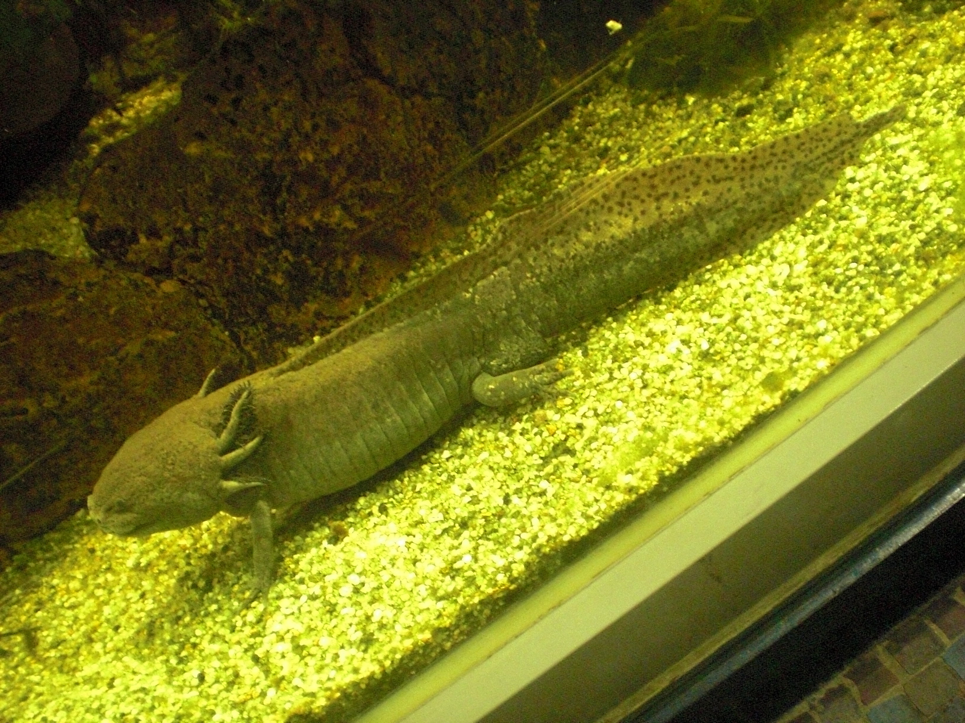 Aksolotlo